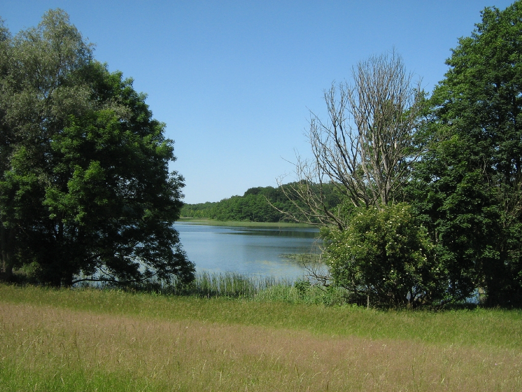 der Dambecker See in der Mecklenburgische Seenplatte (Landkreis Mecklenburg-Strelitz, Mecklenburg-Vorpommern, Germany)